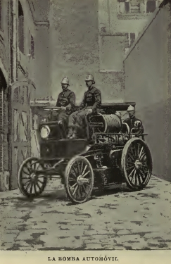 Autobomba, cuerpo de bomberos de París